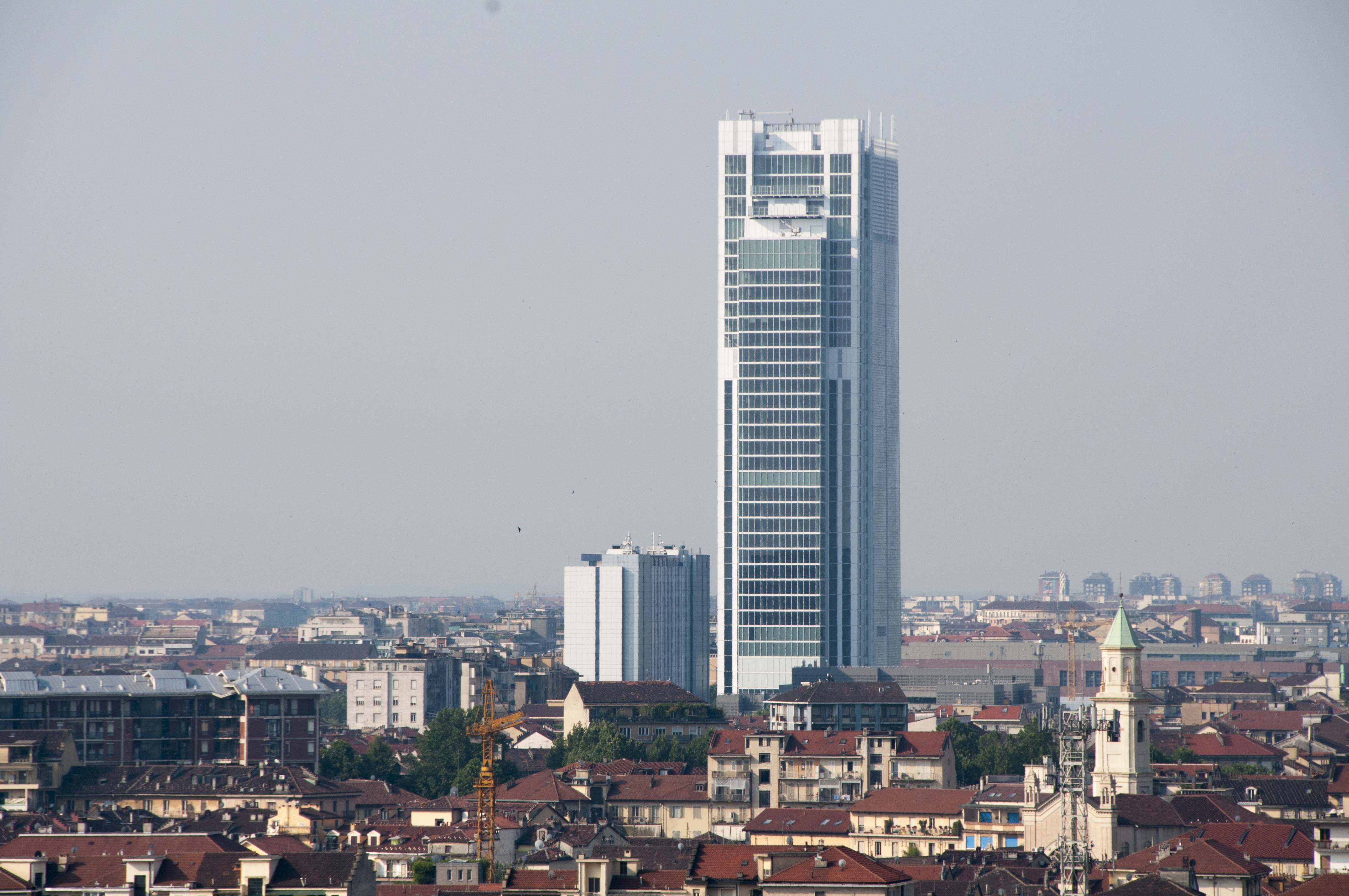 grattacielo Intesa San Paolo